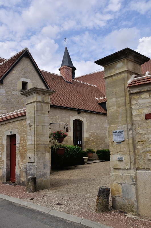 Ségry (Indre) - Mairie